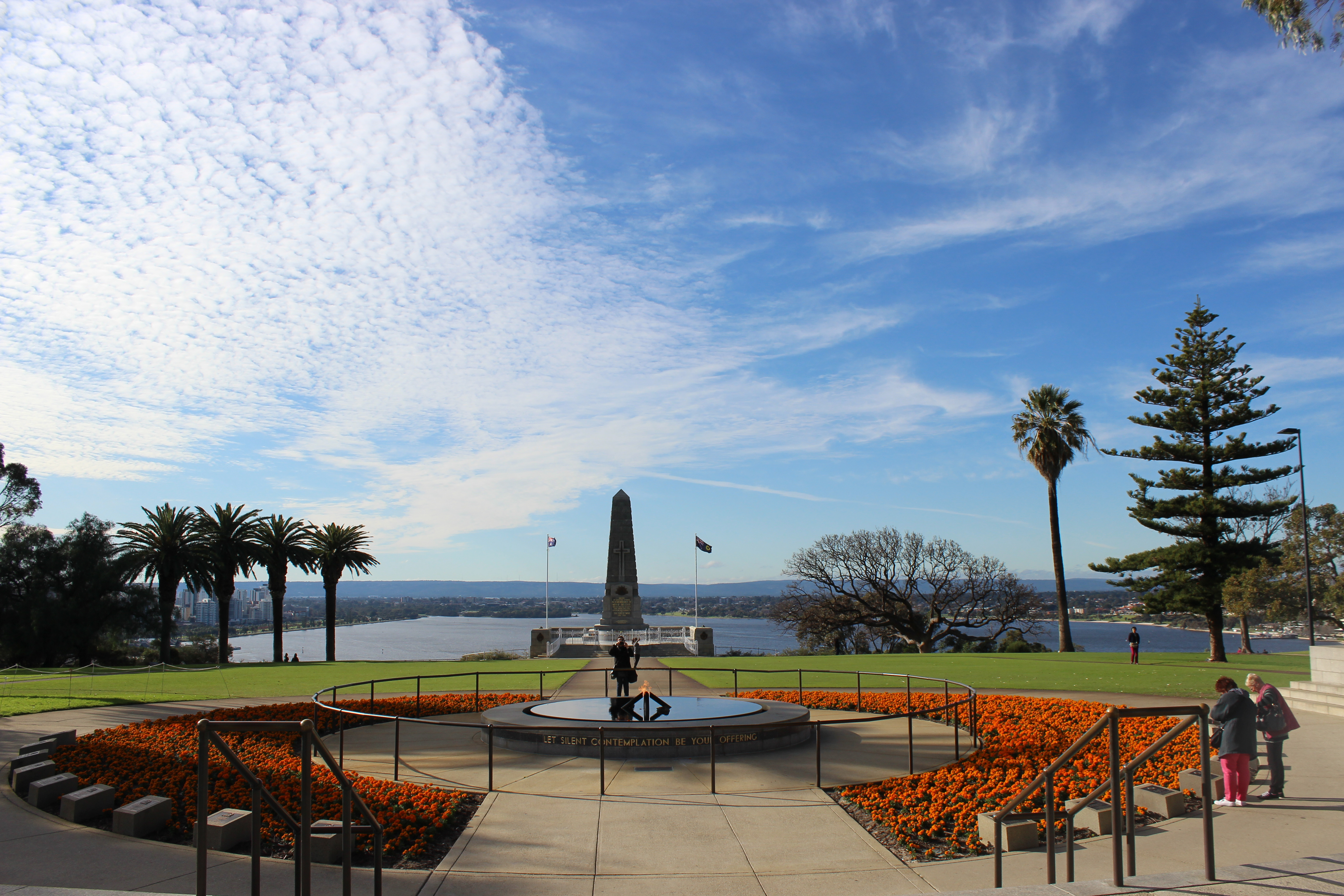 Seen here from the parking lot, this Great War memorial offers splendid view on Swan River and CBD.